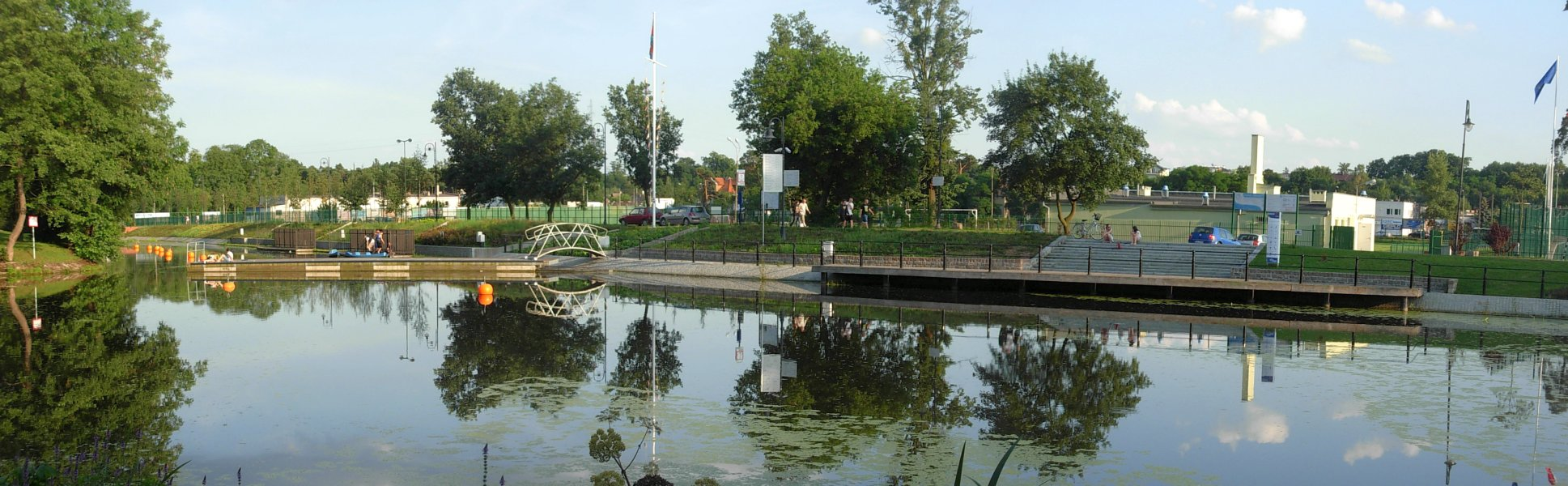 Marina "Gwiazda" na Kanale Bydgoskim w Bydgoszczy